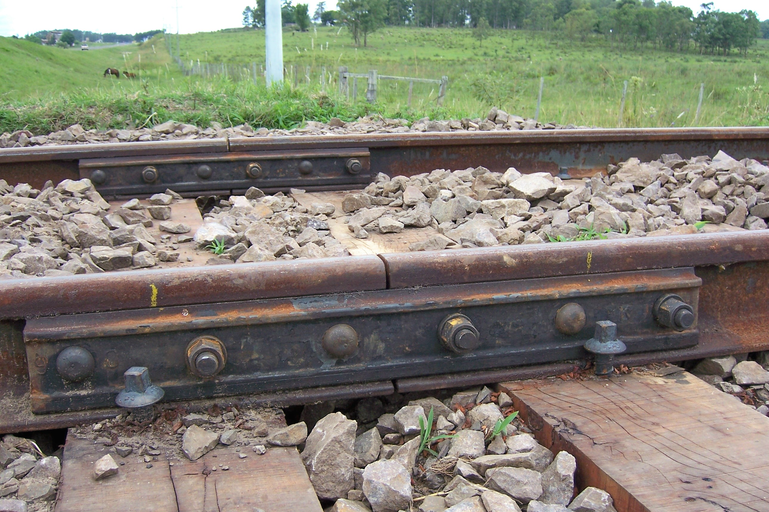 Unión de rieles o carriles en una vía férrea mediante eclisas y bulones.